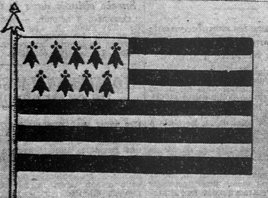 Illustration du Gwenn ha Du datant de 1937